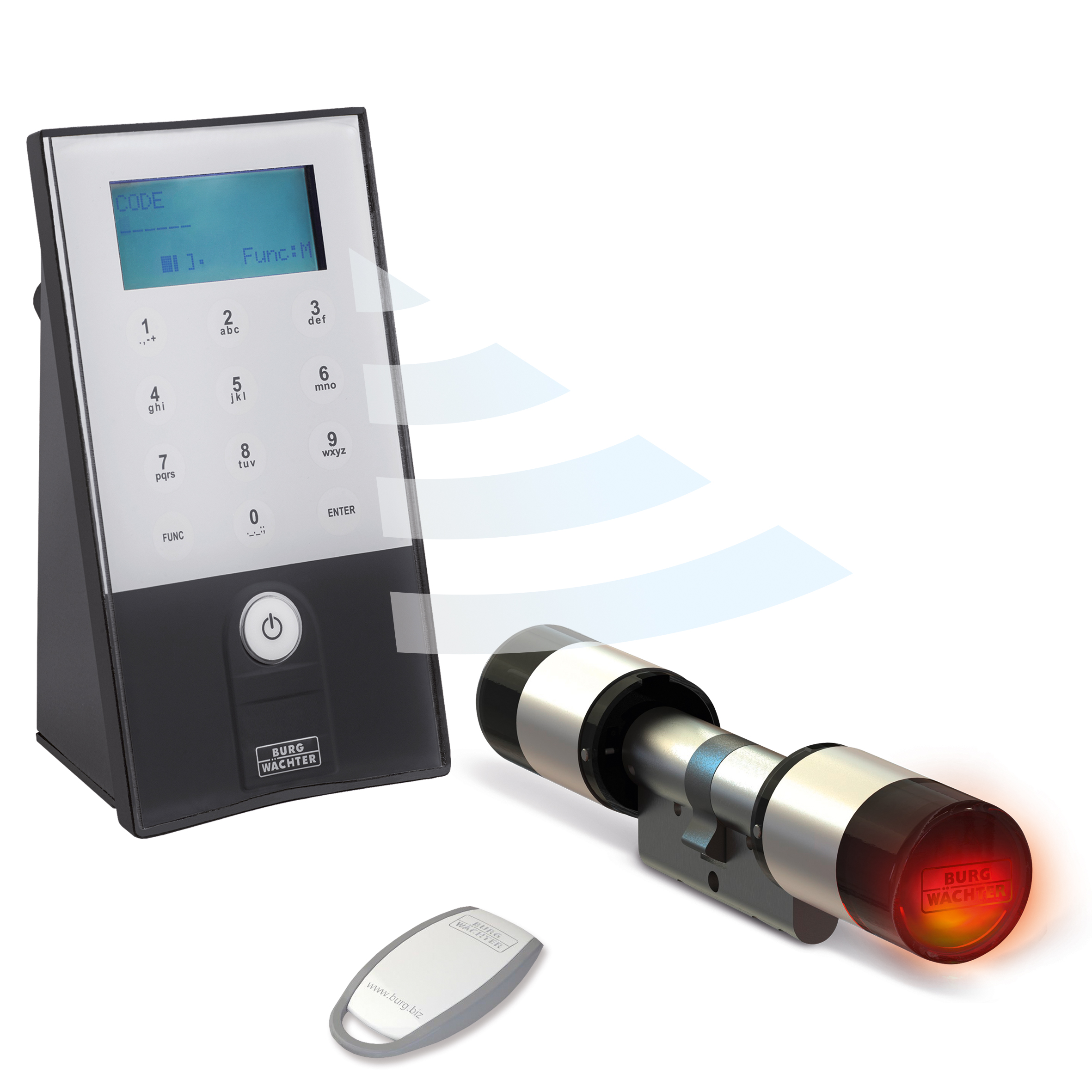 Ohne Schlüssel ins Haus: Mit dem secuENTRY geht's per Fingerabdruck, Code oder Transponder in die eigenen vier Wände.